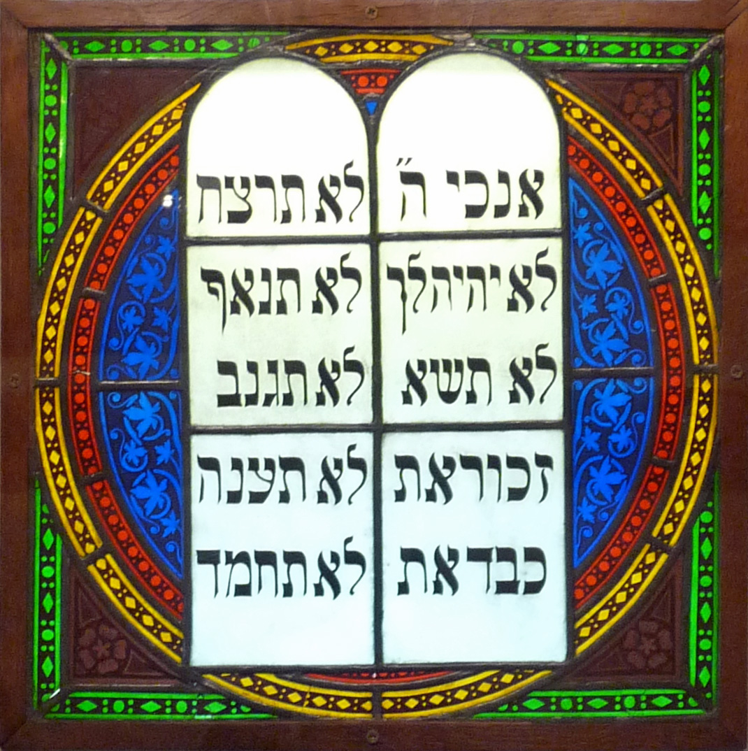 "Les tables de la Loi", vitrail de synagogue, Alsace, fin du 19e siècle, Musée alsacien de Strasbourg.